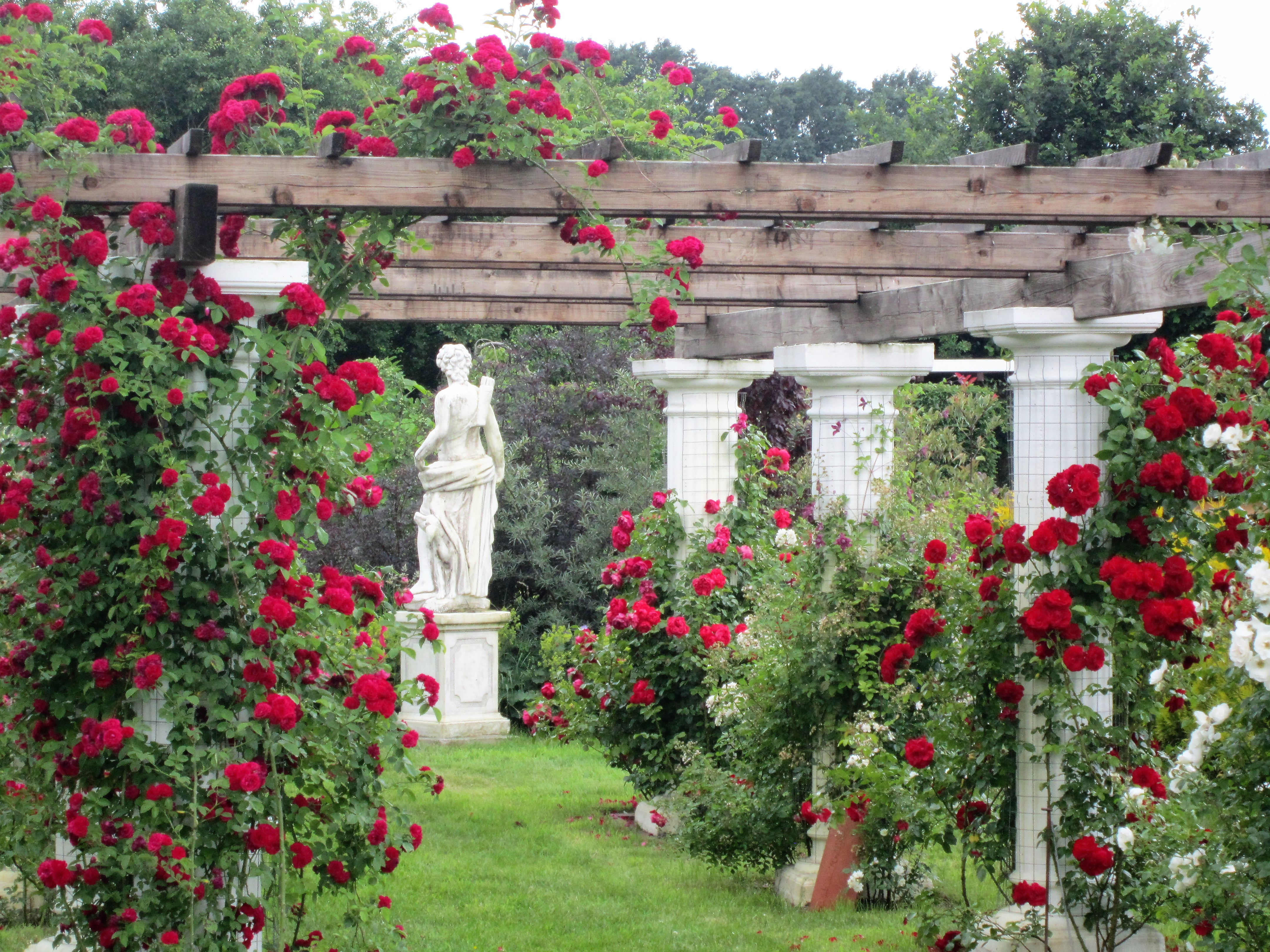 Rosarium bei Everdings Mühle in Groß Mimmelage (Landkreis Osnabrück)